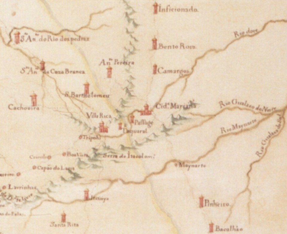 Extrato da "Carta Geografica do Termo de Villa Rica, em q' se mostra que os Arrayaes das Catas Altas da Noroega, Itaberava, e Carijós lhe ficam mais perto, q' ao da Villa de S. José a q' pertencem, e igualmente o de S. Antônio do Rio das Pedras, q' toca ao do Sabará, o q' se mostra, pelas Escalas ou Petipé de leguas." por Claudio Manoel da Costa